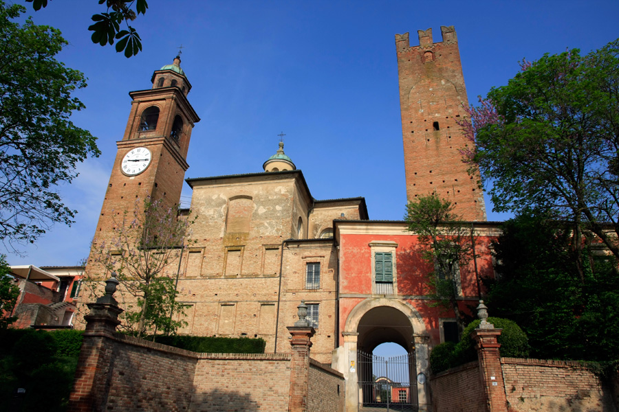 Castello di Castelnuovo Fogliani, frazione di Alseno